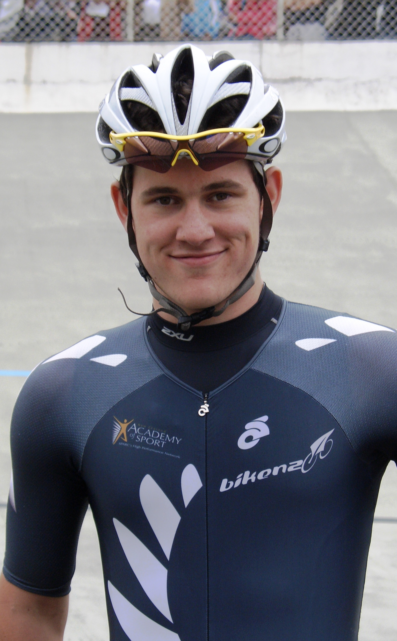 Sam Webster, neuseel. Radrennfahrer